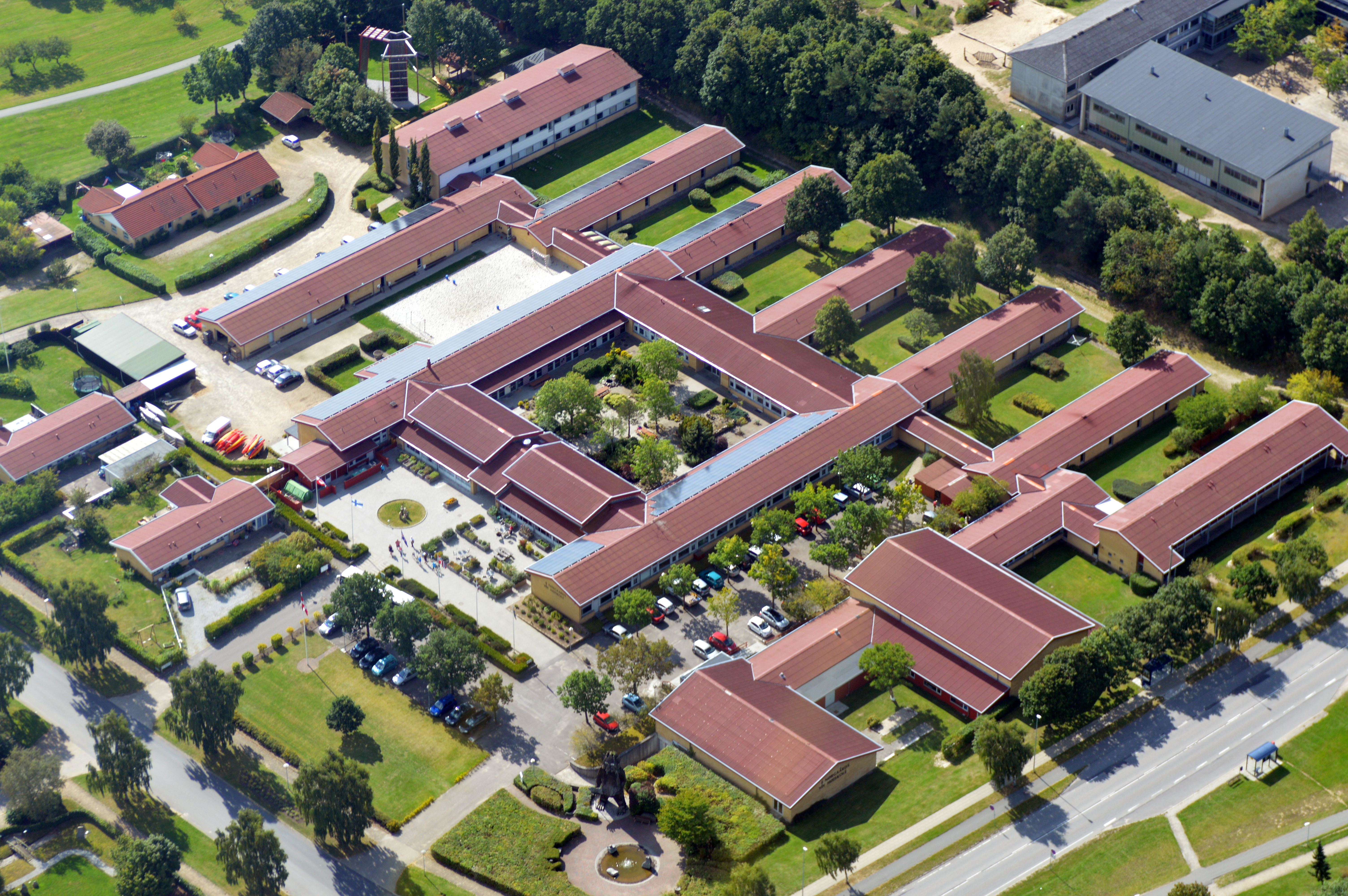 Nørgaards Højskole luftfoto taget af Tommas Rubæk Amstrup, Nørgaards Højskole